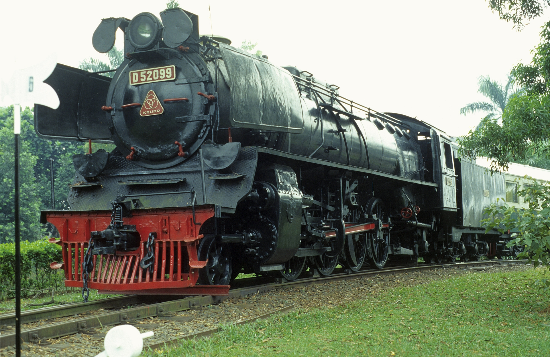 DKA D52 (52 99 A)